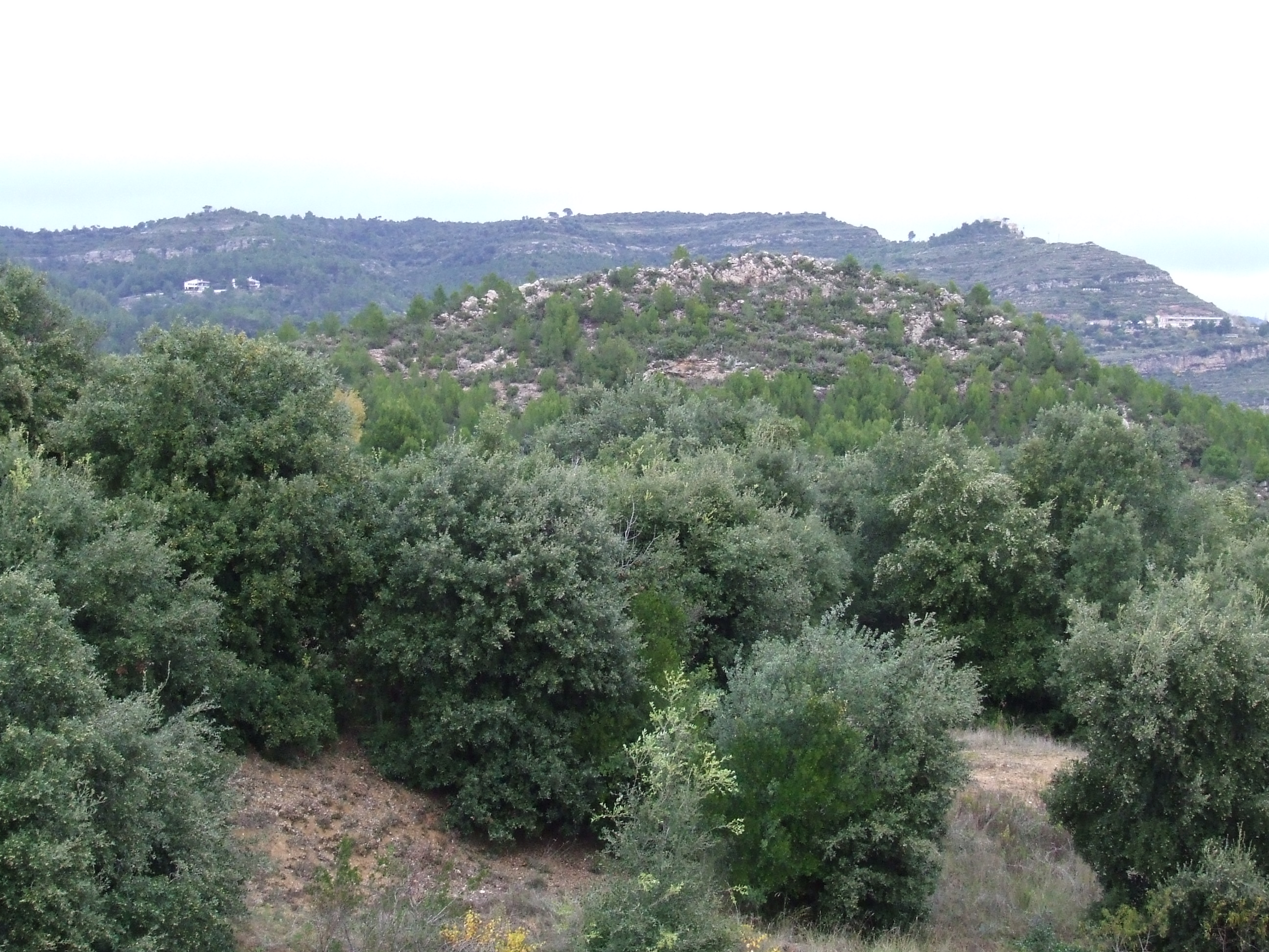 Turó d'en Rossic (Riells del Fai, Bigues i Riells, Vallès Oriental)